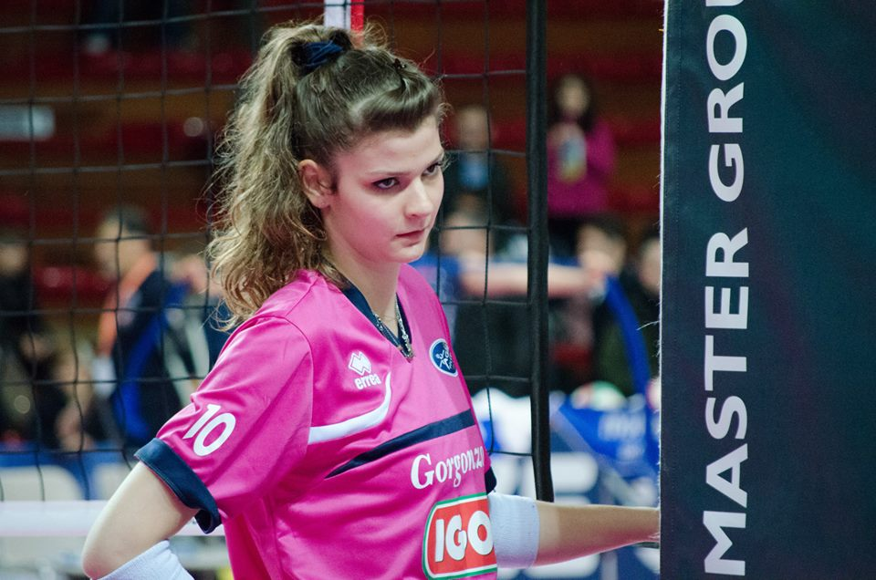 Cristina Chirichella, pallavolista italiana, gioca nel ruolo di centrale